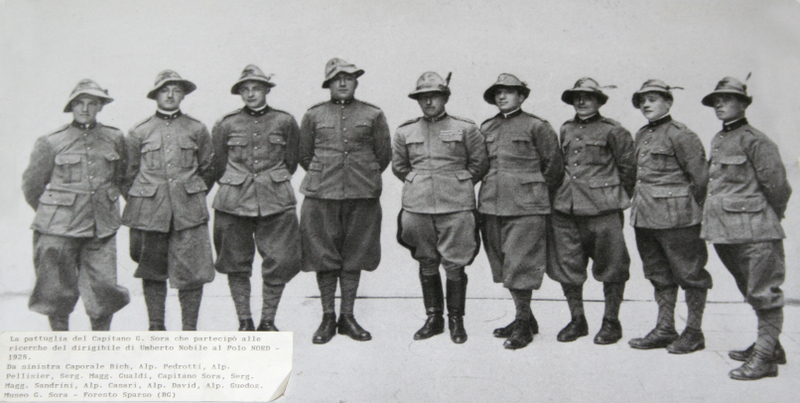 Gennaro Sora e la sua squadra al Polo Nord, ripresa e caricata da Giorces. Trasmessa a l'autorizzazione Del Sig. Sindaco che si ringrazia per la collaborazione. OTRS #2007071910019591